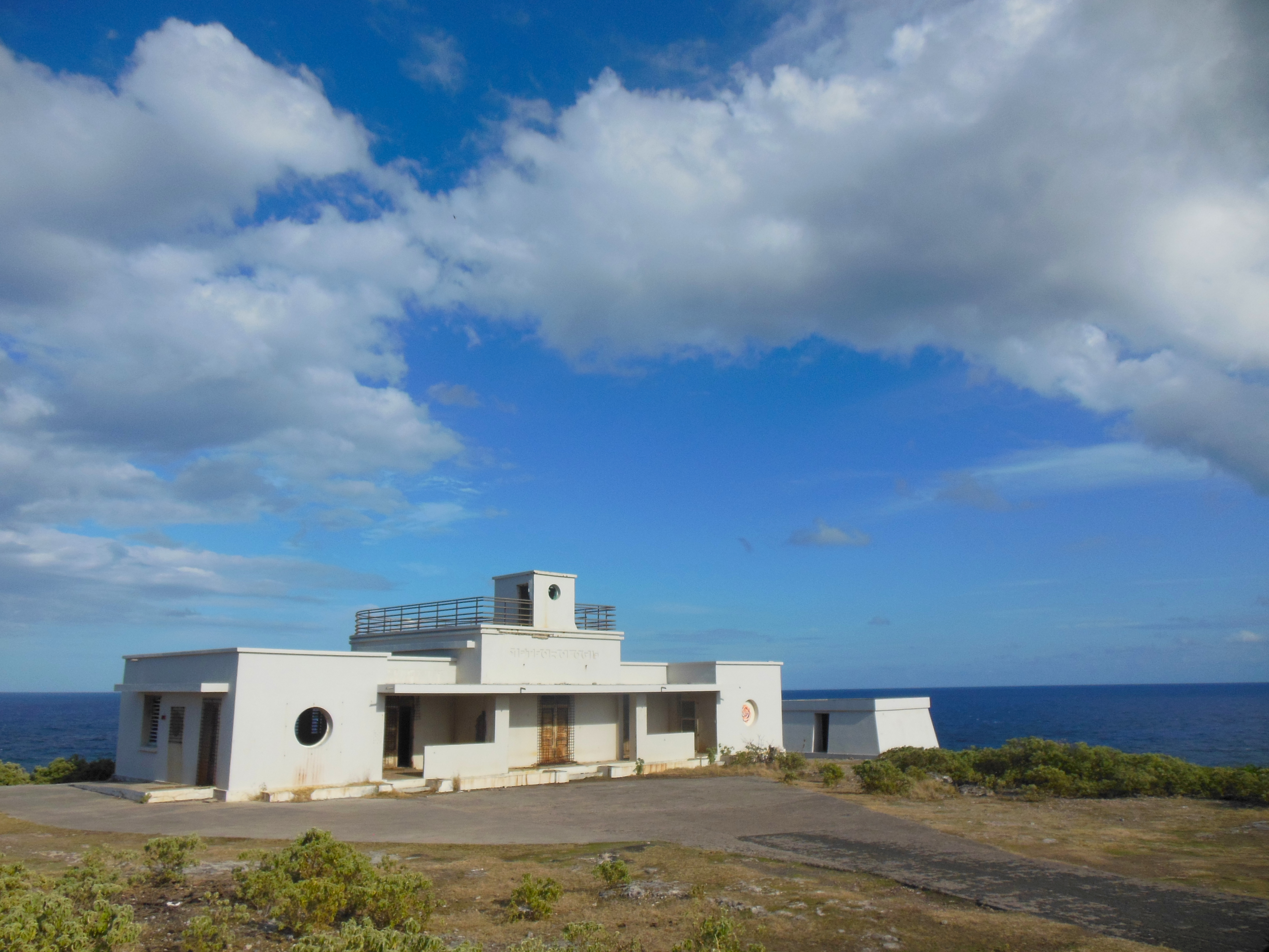 ANCIENNE STATION METEO LA DESIRADE